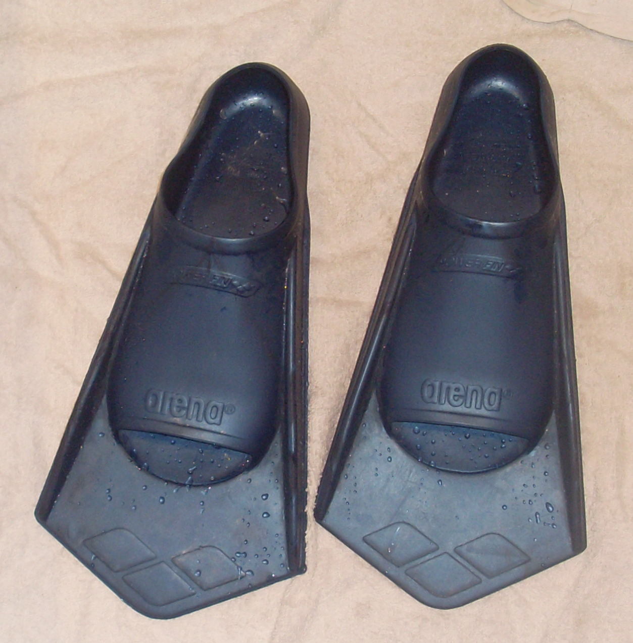 Palmes de natation